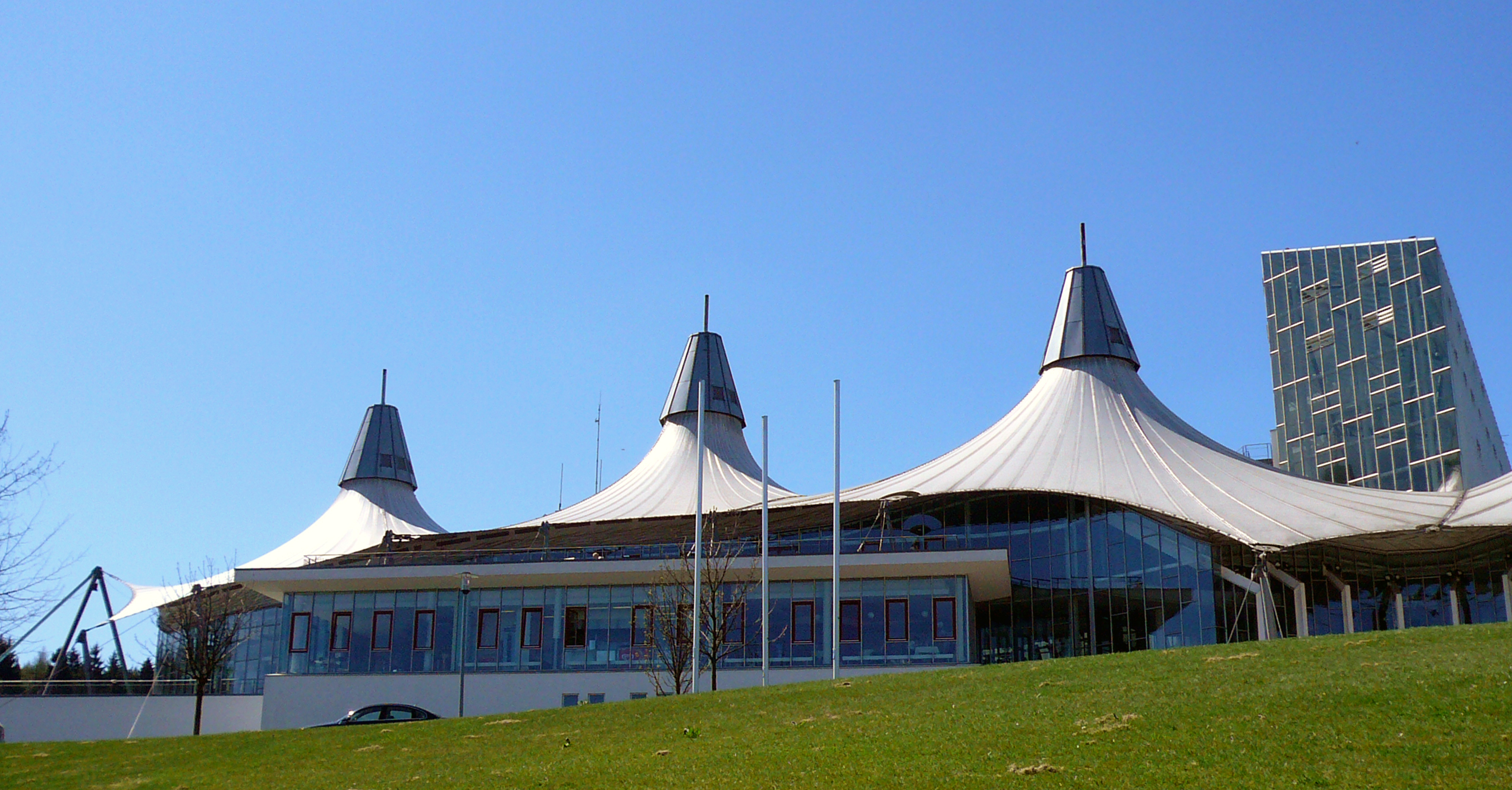 Prof. Volhard Hosoital in Masserberg